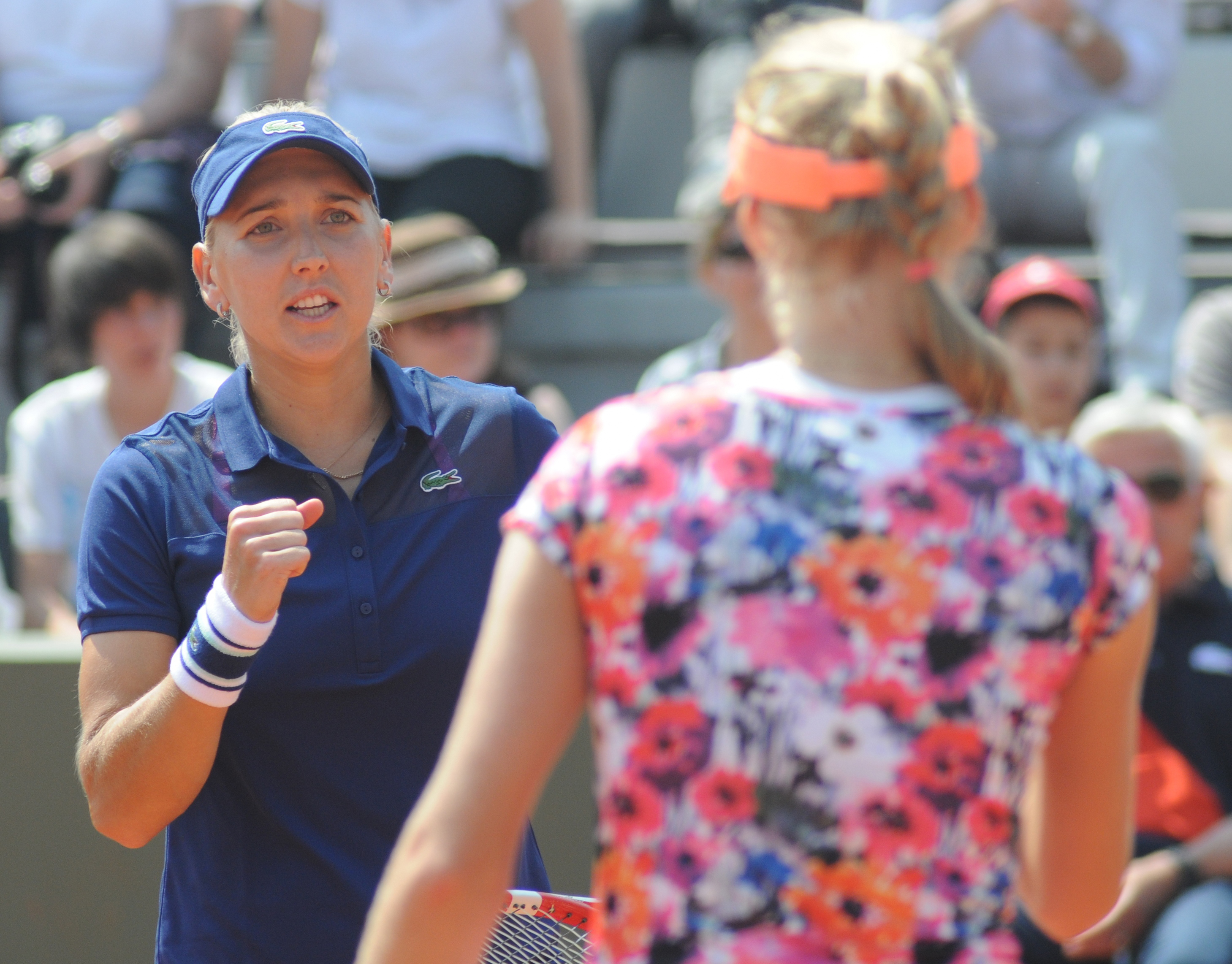 Elena Vesnina & Ekaterina Makarova